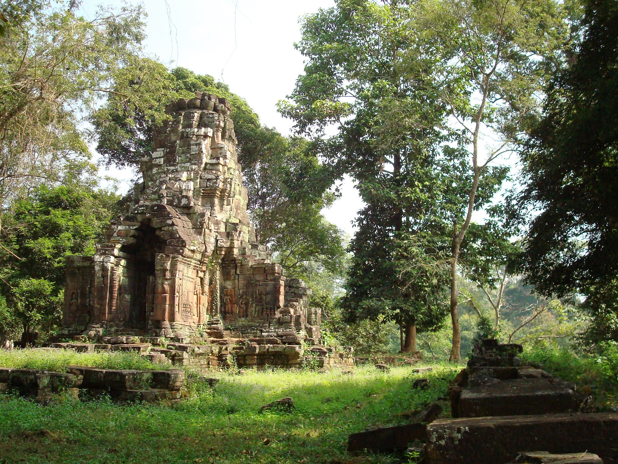 Südöstlicher Prasat Chrung von Angkor Thom